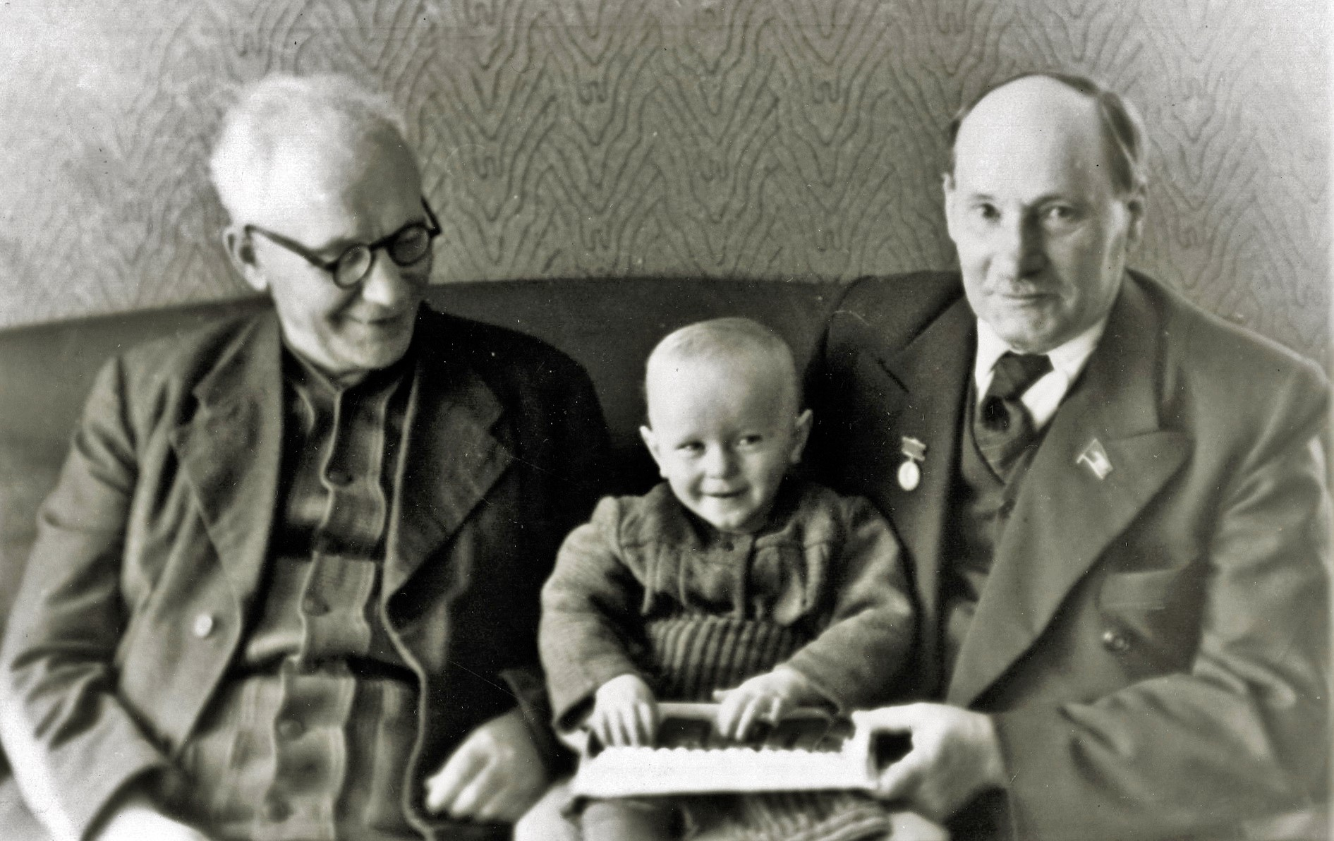 Янка Маўр і Якуб Колас разам з агульным першым унукам. Каля 1947 года. Фота з сямейнага архіва Міцкевічаў